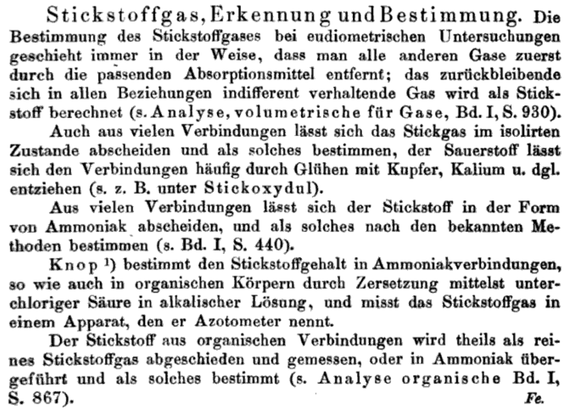 Azotometer